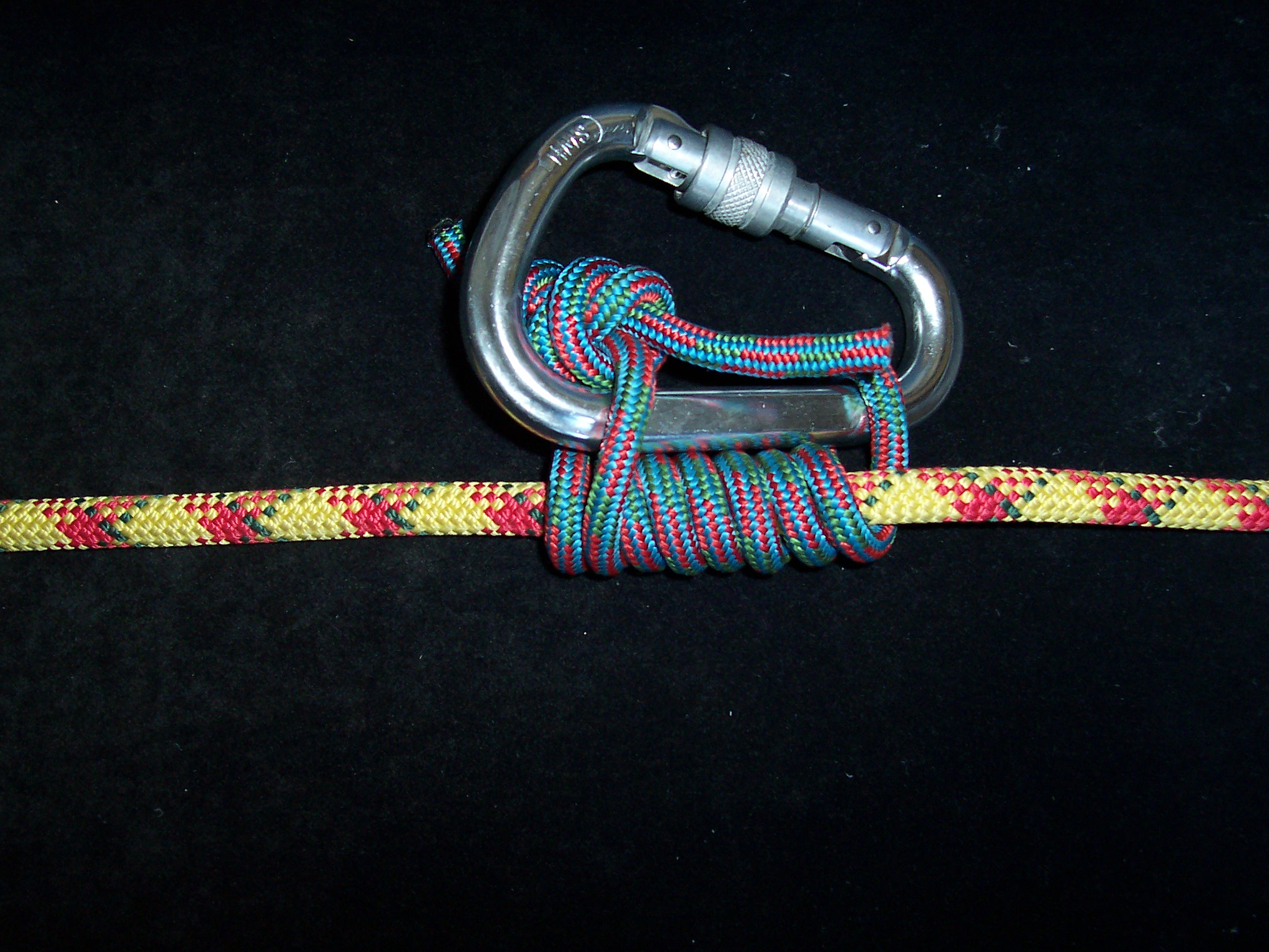 blocker